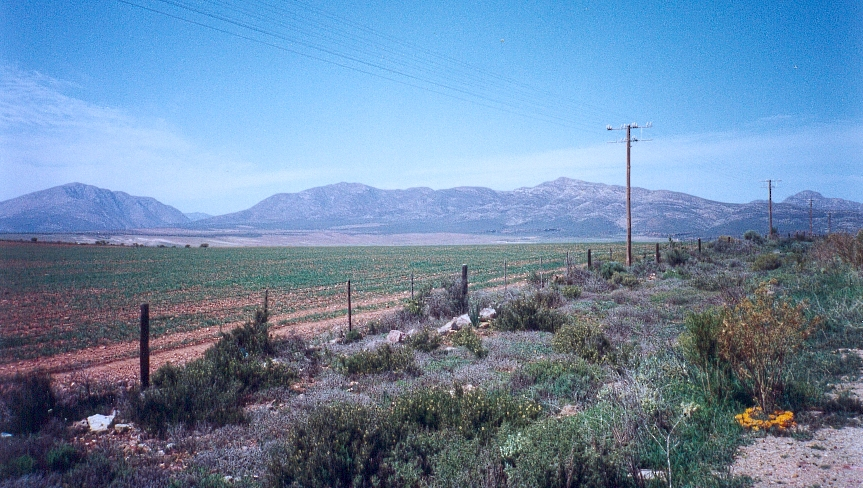 'n Landskap van die Klein Karoo tussen George en Oudtshoorn, met 'n uitsig op Perdekloof en die voetheuwels van die Outenikwareeks.